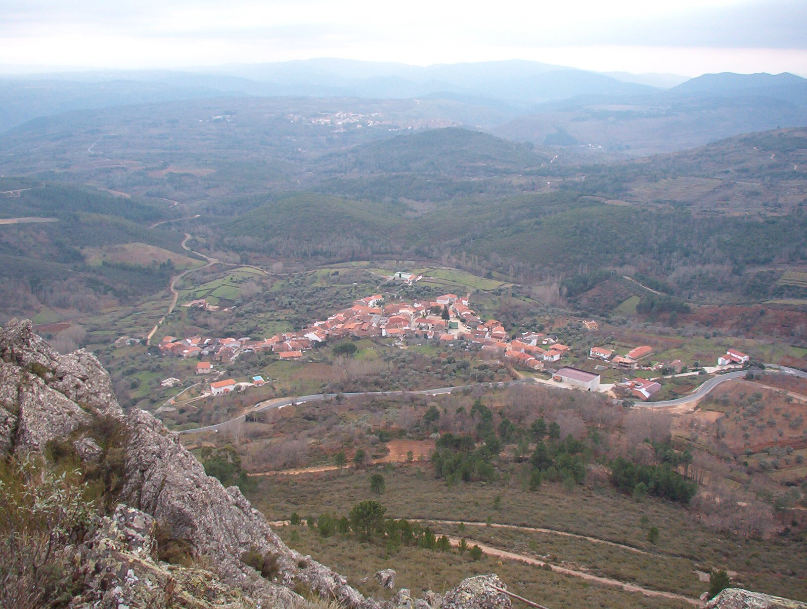 Imagen del pueblo de Garcibuey (Salamanca) tomada por mi desde el cercano monte conocido como el "Gancho" en la navidad 2004-2005.